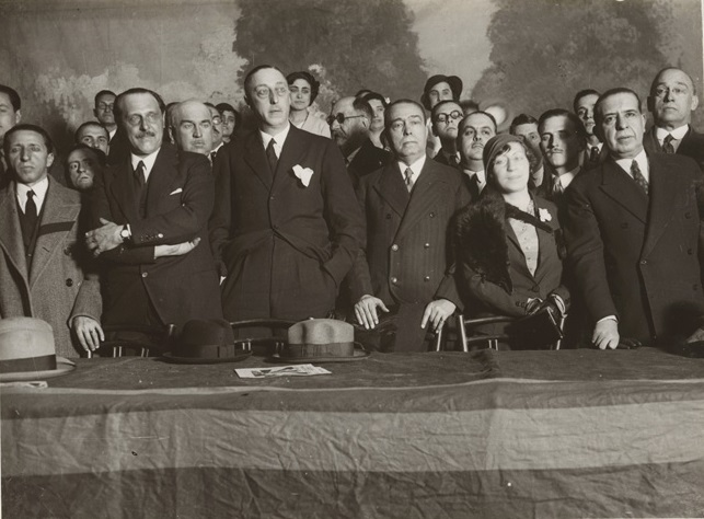 Taula presidencial d'un míting organitzat pel Cercle Tradicionalista. Teatre Bosque, Barcelona